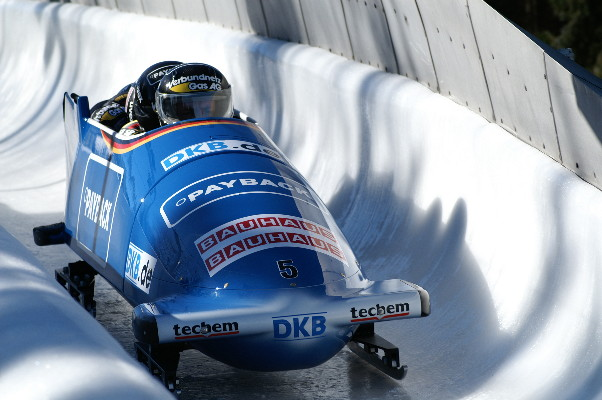 Der Andre Lange Bob GER1 bei der Siegesfahrt im 4ten Lauf.